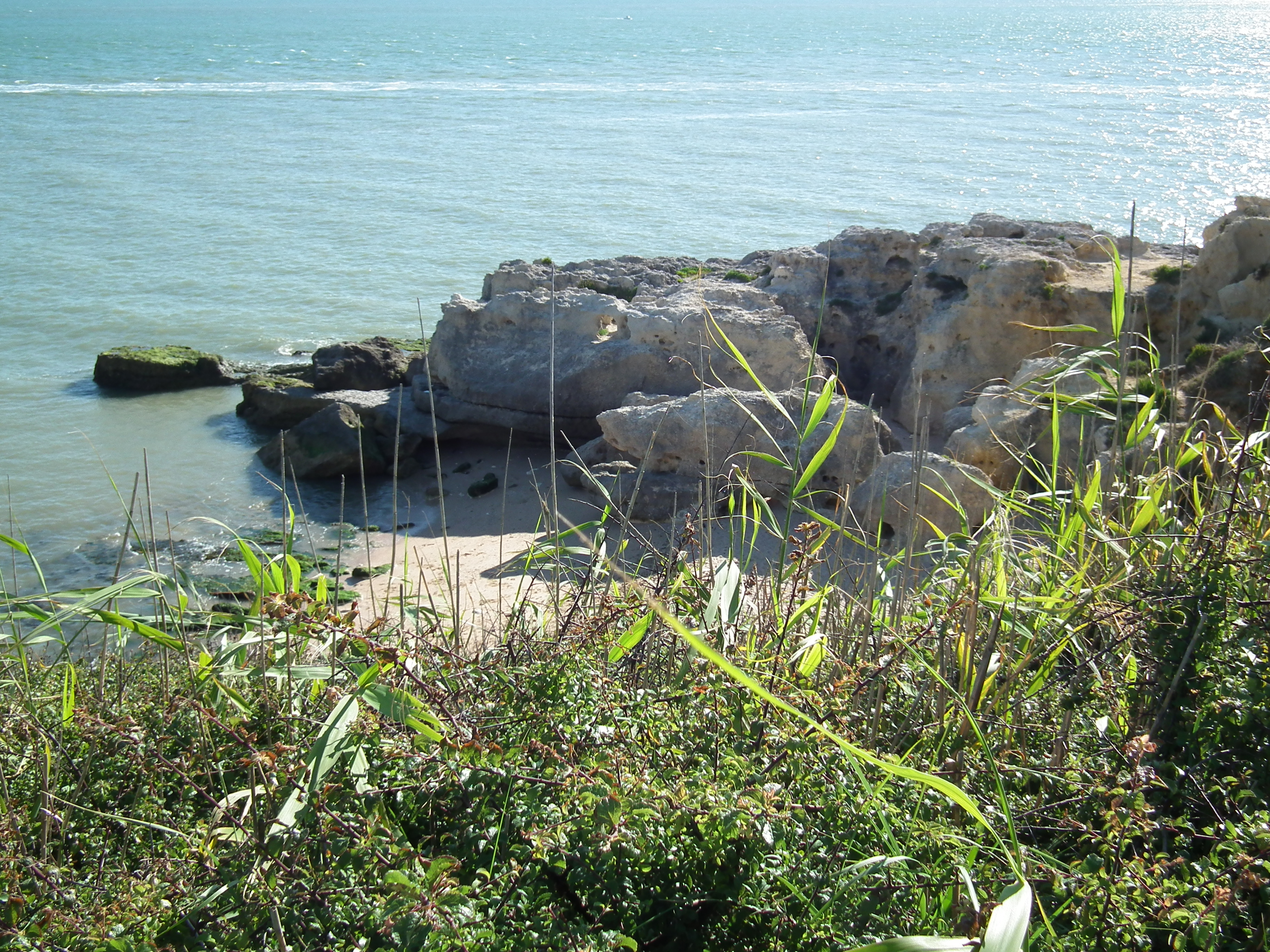 Crique à Saint-Georges-de-Didonne